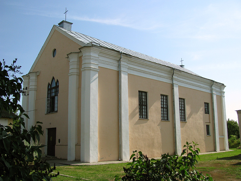 Беларуская (тарашкевіца): Касьцёл Сьв. Пятра і Паўла. г. Шклоў This is a photo of Belarusian heritage monument. Reference number: 513Г000568 ( WLM)